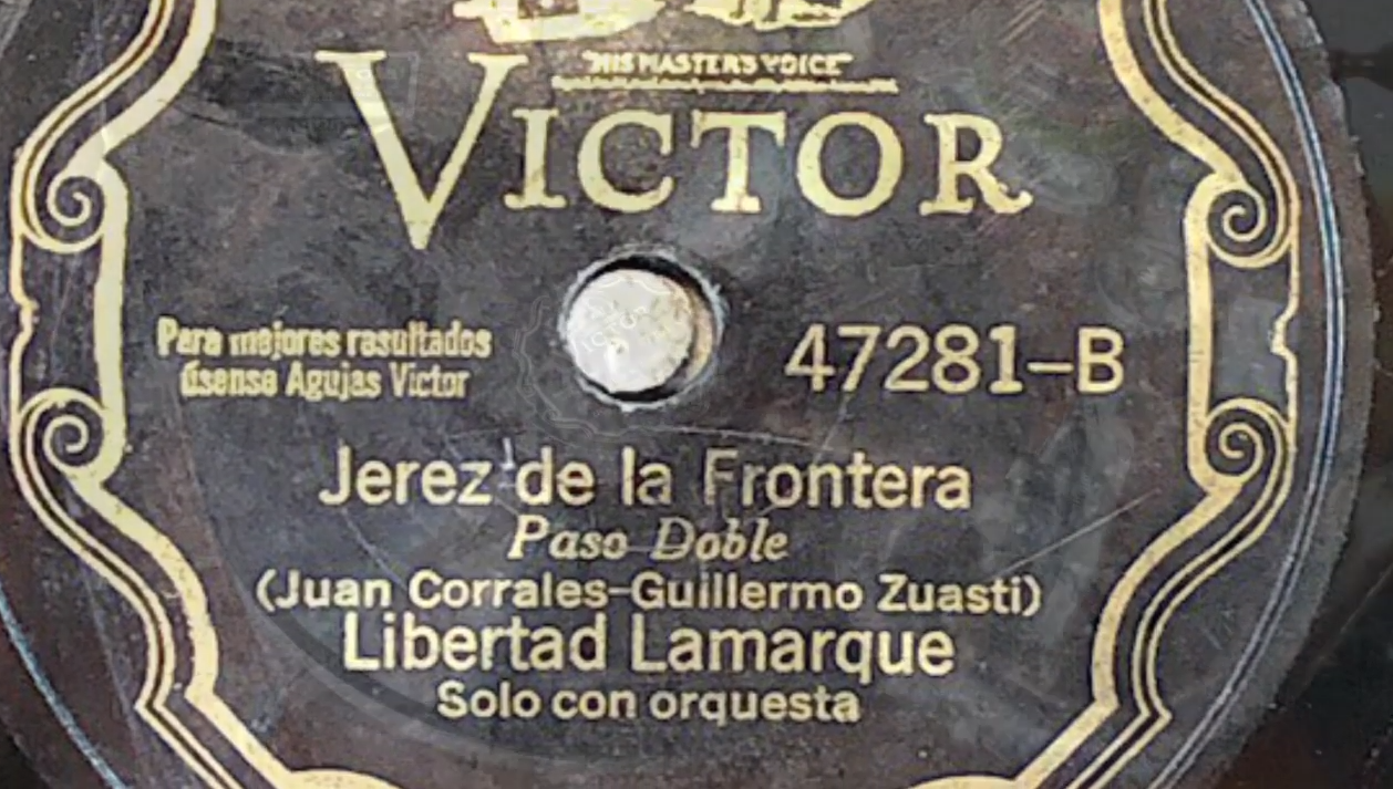 Disco Guillermo Zuasti